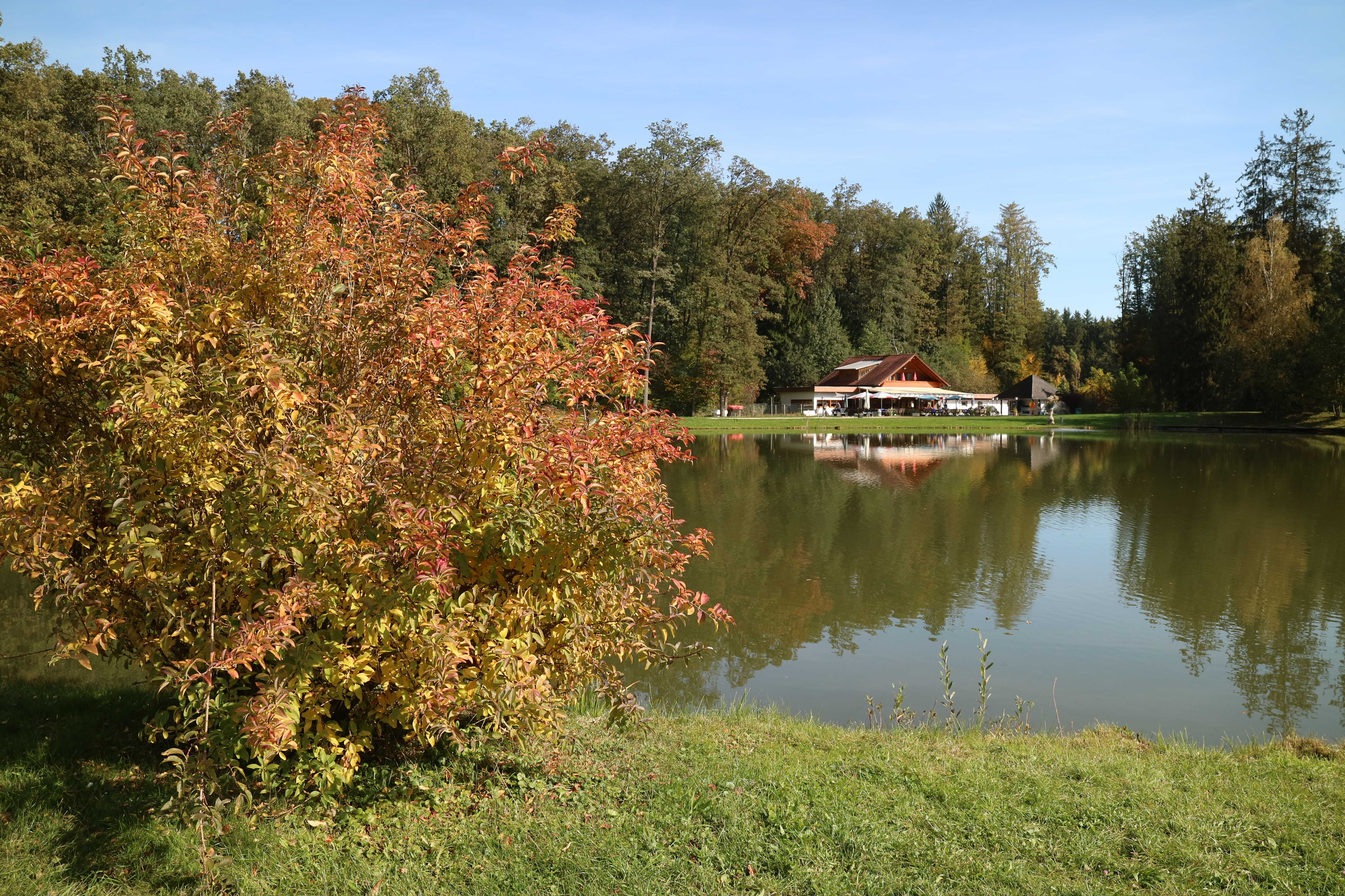 Wundschuher Teich mit Gasthaus